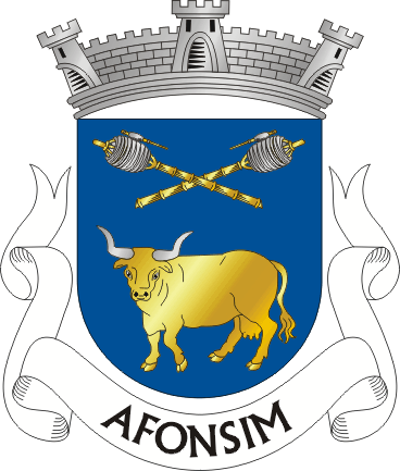 Brasão da freguesia de Afonsim (concelho de Vila Pouca de Aguiar)